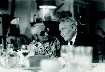 Foto di Felix Pollaczek